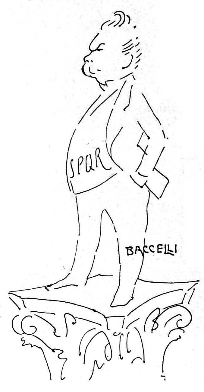 Caricatura di un parlamentare di Luca Beltrami